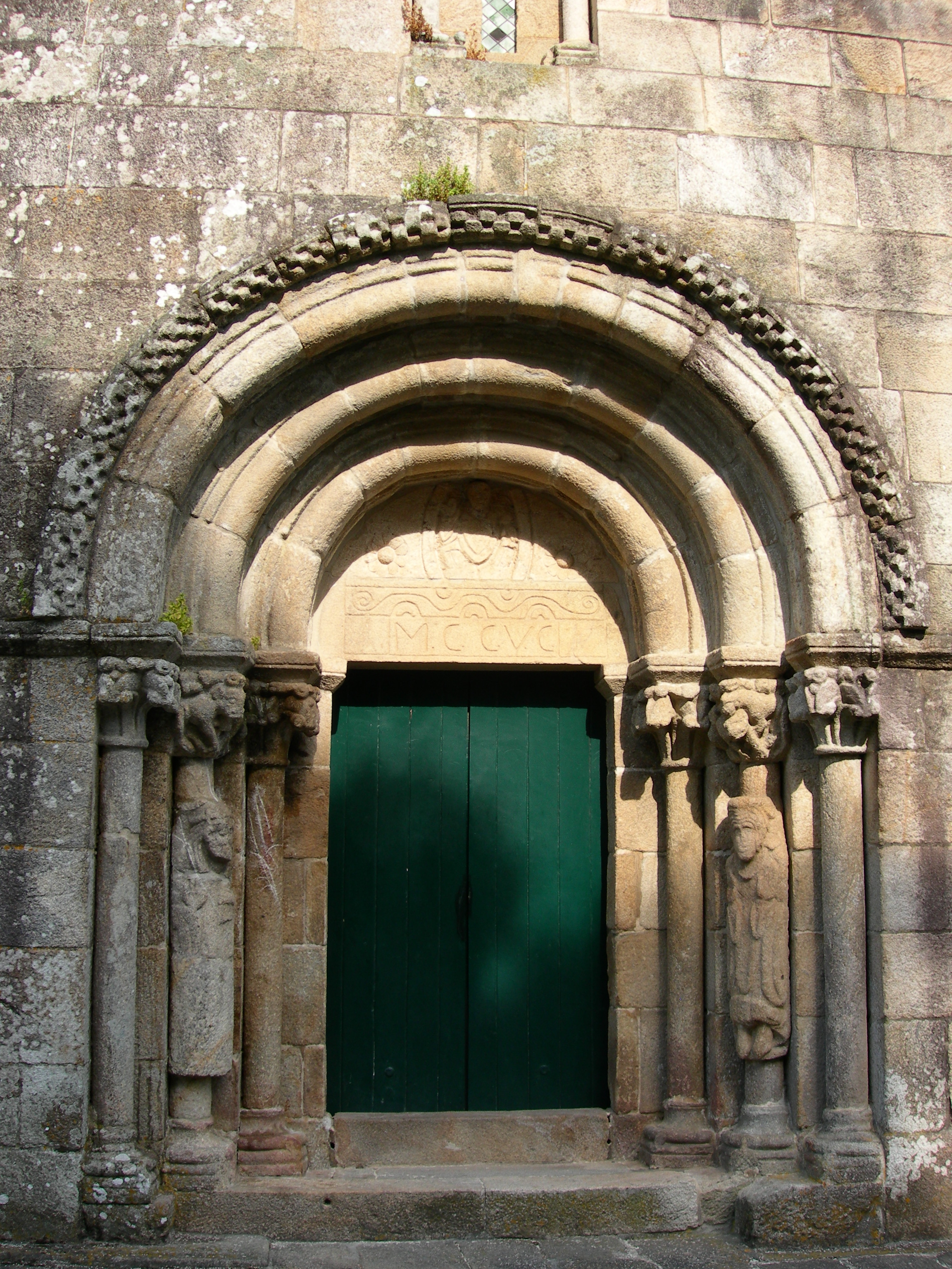 Igreja de São Pedro de Rubiães III This file was uploaded for Wiki Loves Monuments in Portugal with the unique identifier 71137.